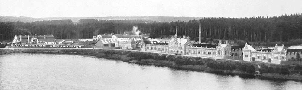 Södertelge Werkstäder (S.W.) i Södertälje